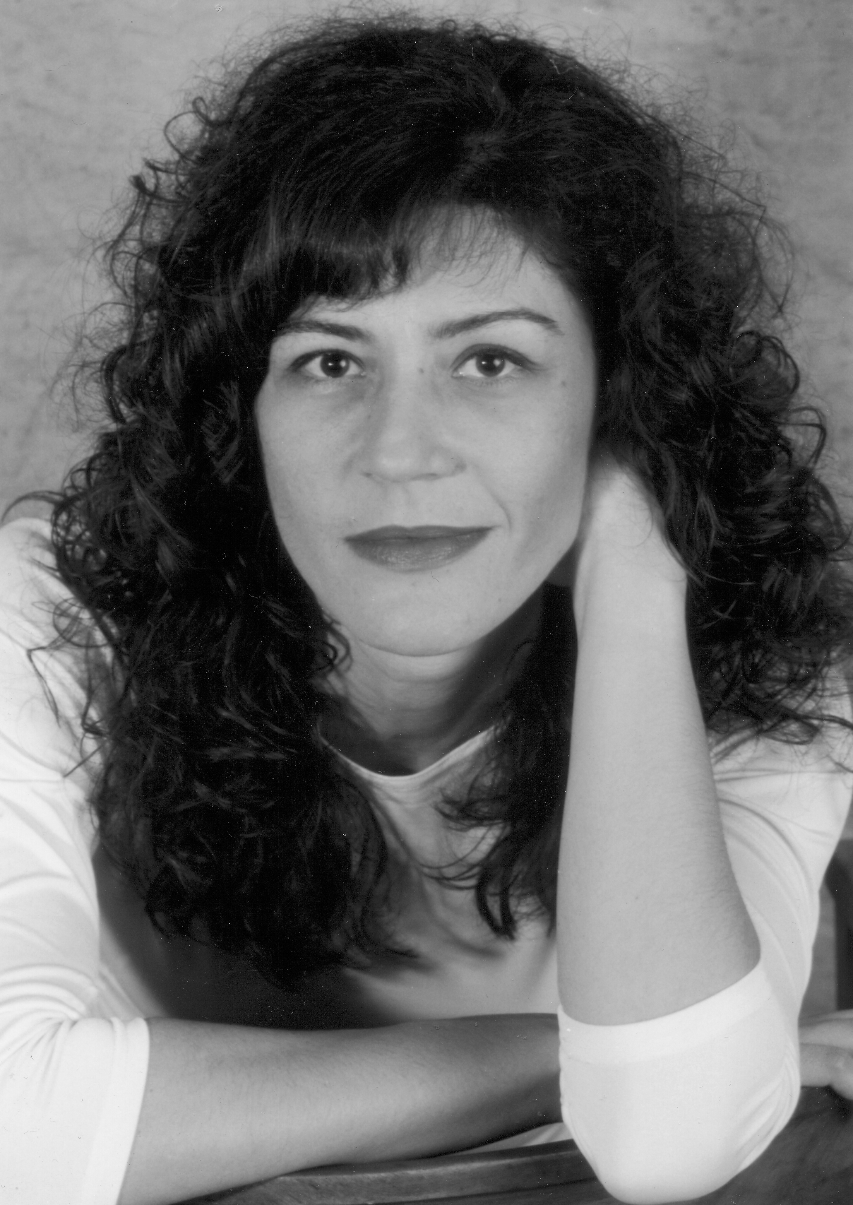 Ángeles López (Madrid -España-1969), es escritora y periodista. Autora en 2006 de la novela “Martina, la rosa número trece” (Seix Barral) –con prólogo de Antonio Muñoz Molina-, que ha cosechado un gran éxito con más de 20.000 ejemplares vendidos. A medio camino entre la ficción y la historia, relata el periplo vital de Martina Barroso, una de las llamadas Trece Rosas.